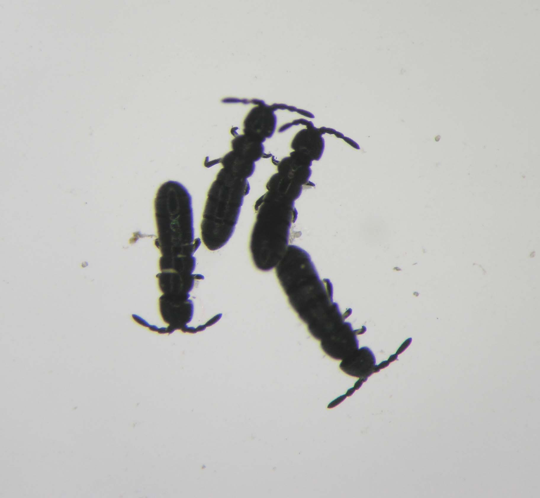 Desoria saltans Creative Commons – Namensnennung-Weitergabe unter gleichen Bedingungen 3.0 Deutschland